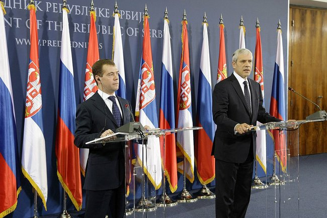 20 октября 2009 года БЕЛГРАД, СЕРБИЯ. Пресс-конференция по итогам российско-сербских переговоров. С Президентом Сербии Борисом Тадичем.